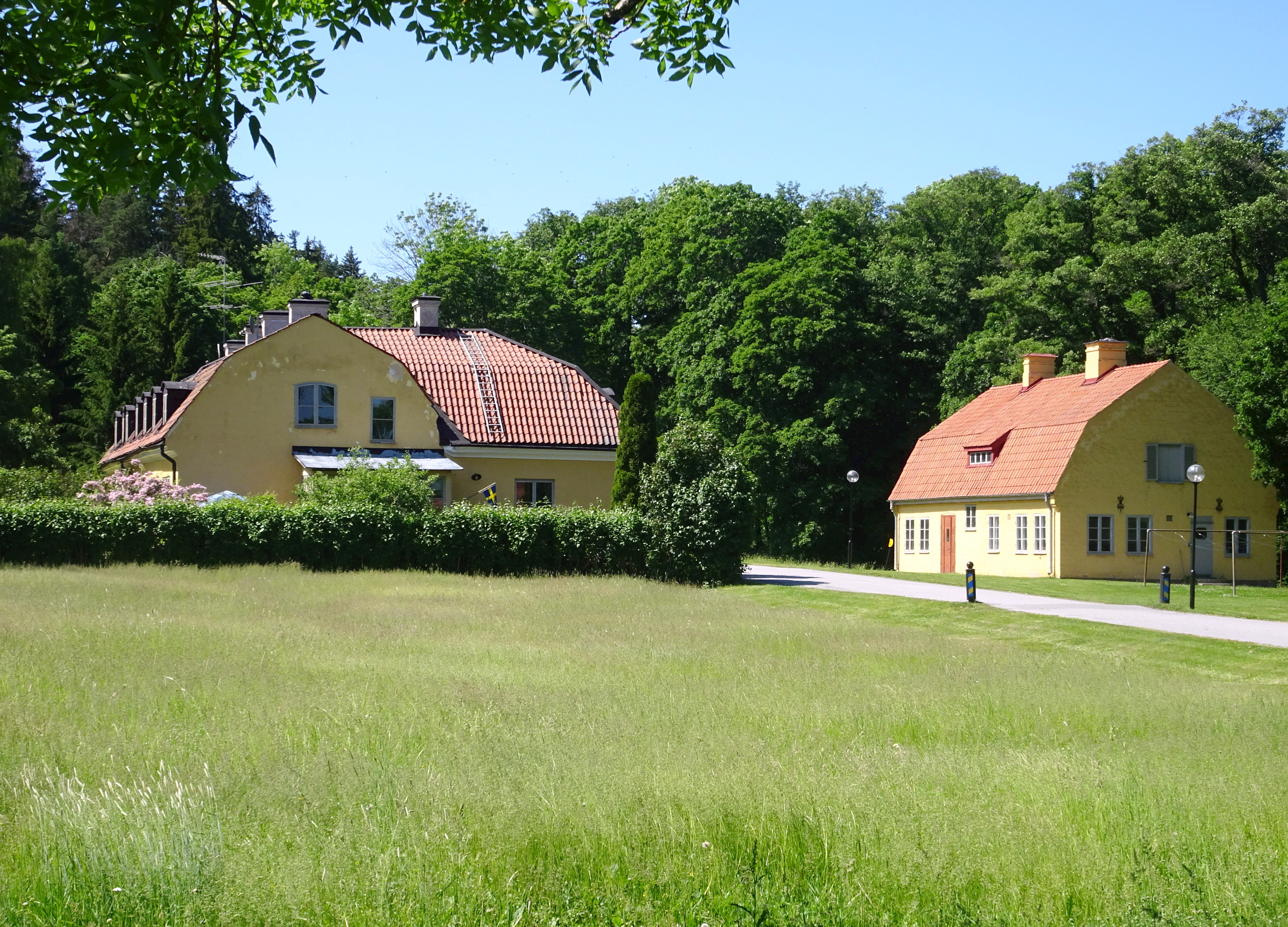 Ulriksdals Fasanbyggnad (t.v.) och Tvättstuga